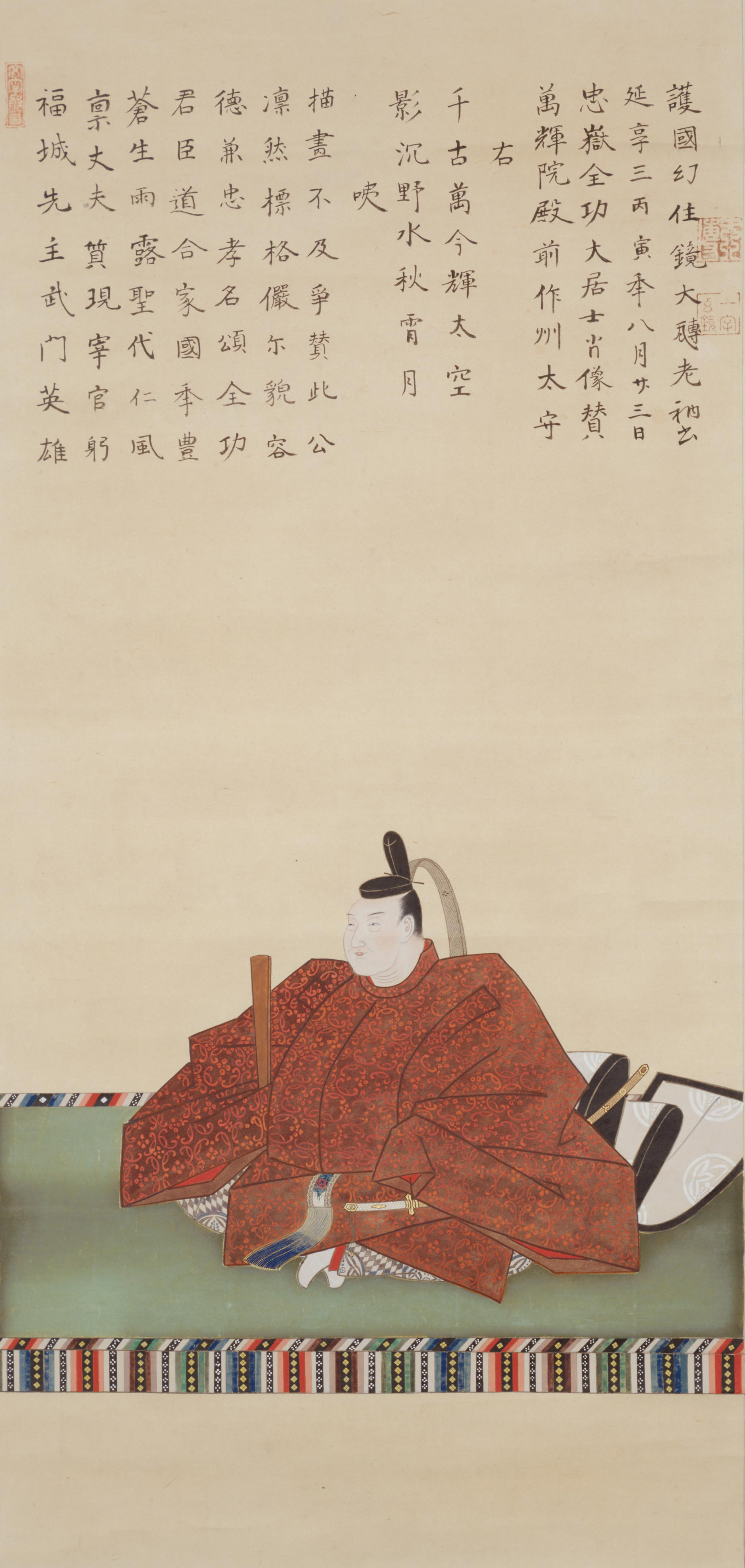 水野勝種の肖像。